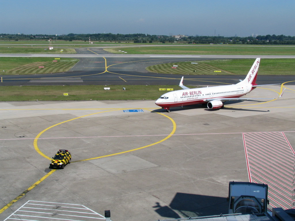 Boeing 737 folgt einem Follow me car